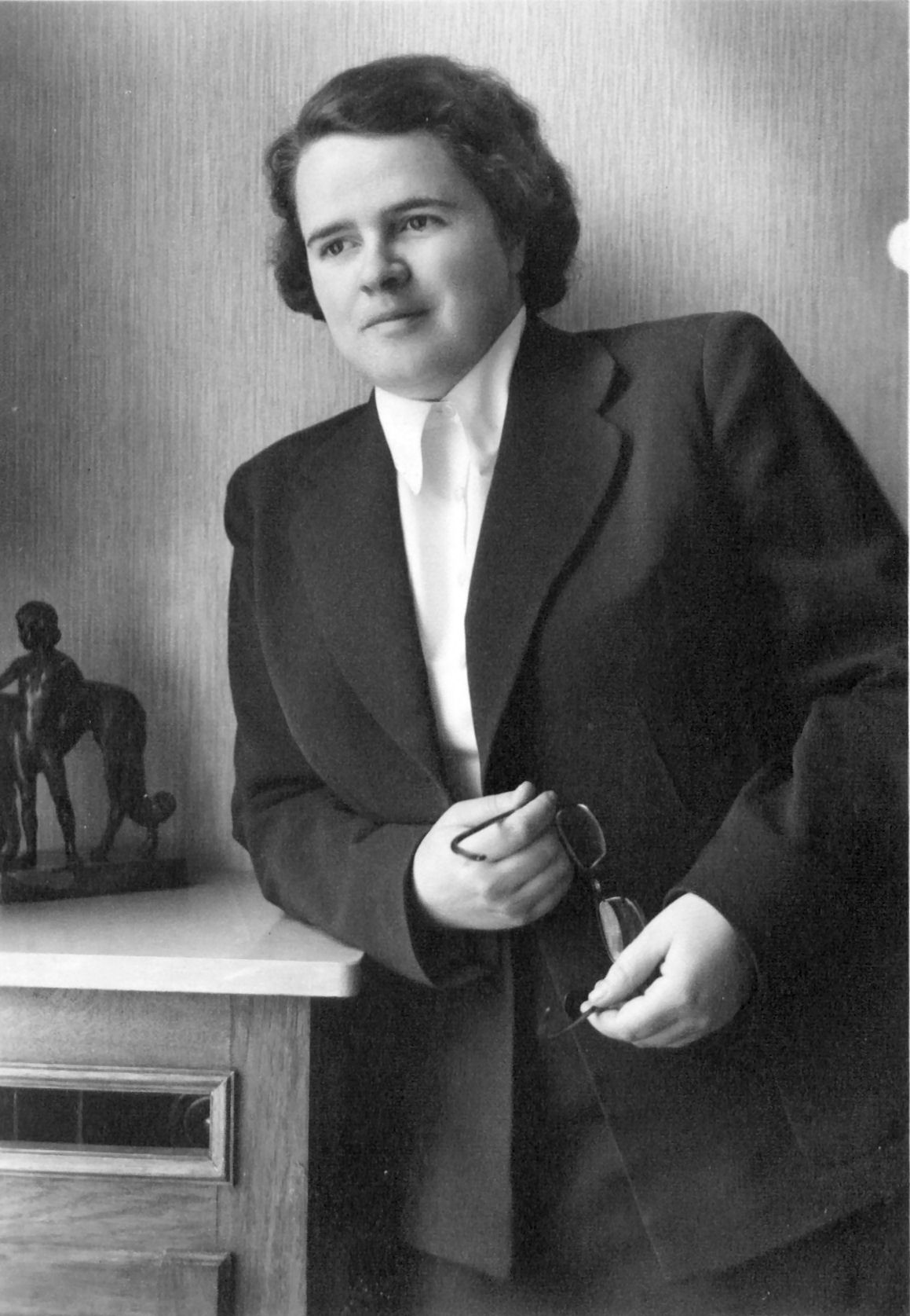 Foto von Ellen Wiederhold (1921-1995), Lackfabrikantin und Bürgermeisterin in Hilden